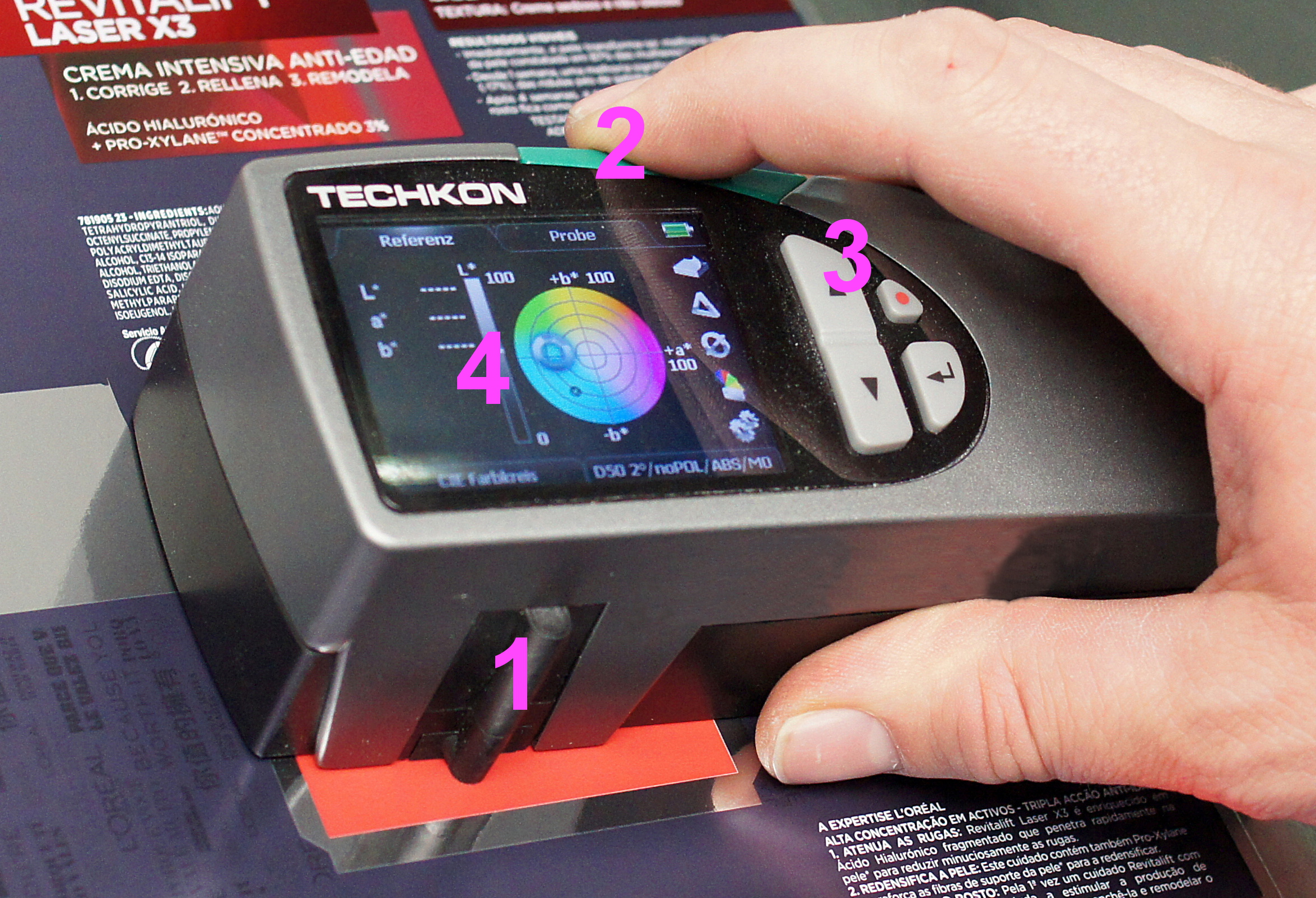 Spektraldensitometer für Einzelmessungen. 1 – senkrechte Messoptik, unter der sich das in einem Winkel von 45° beleuchtete Messobjekt (hier eine mit roter UV-Sonderfarbe überdruckte Metallfolie) befindet; 2 – Taste für das Auslösen der Messung; 3 – Menütasten; 4 – Diplay (bereit zum Anzeigen des Farborts der roten Druckfarbe im CIELAB-Farbkreis)